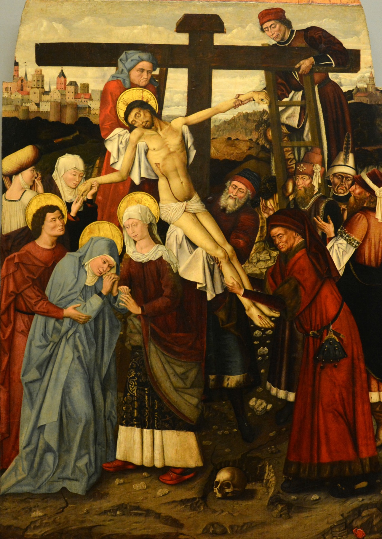 Vedi titolo